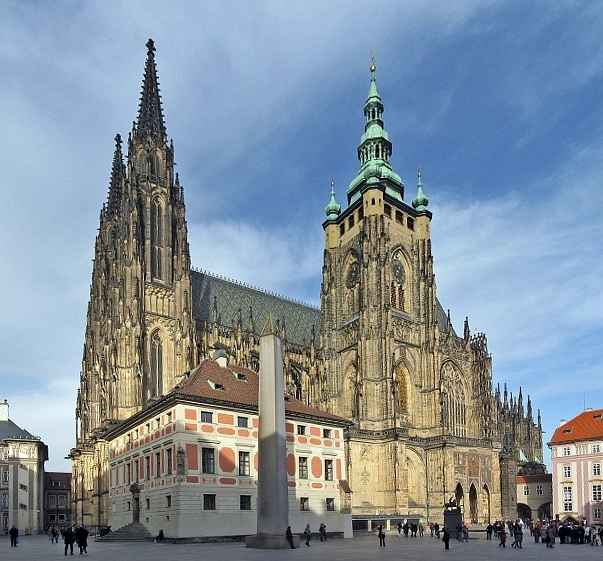 Прага. Собор св. Вита